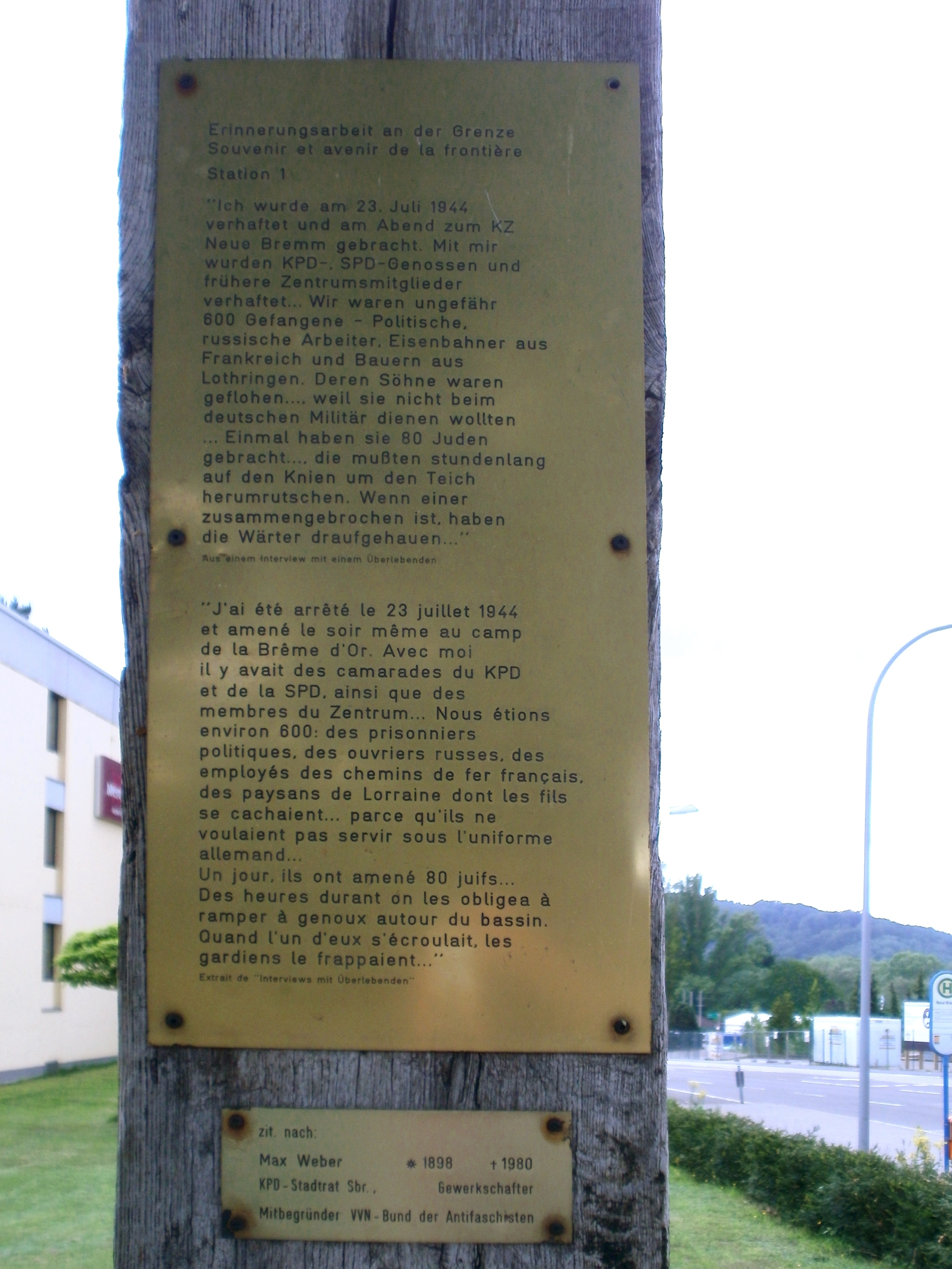 Tafel am Gestapo-Lager Neue Bremm (Saarbrücken)